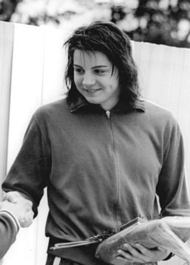 Angelika Franke